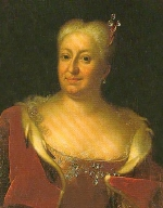 Sophie Charlotte von Hessen-Kassel (1678-1749), Herzogin zu Mecklenburg (1678-1749)